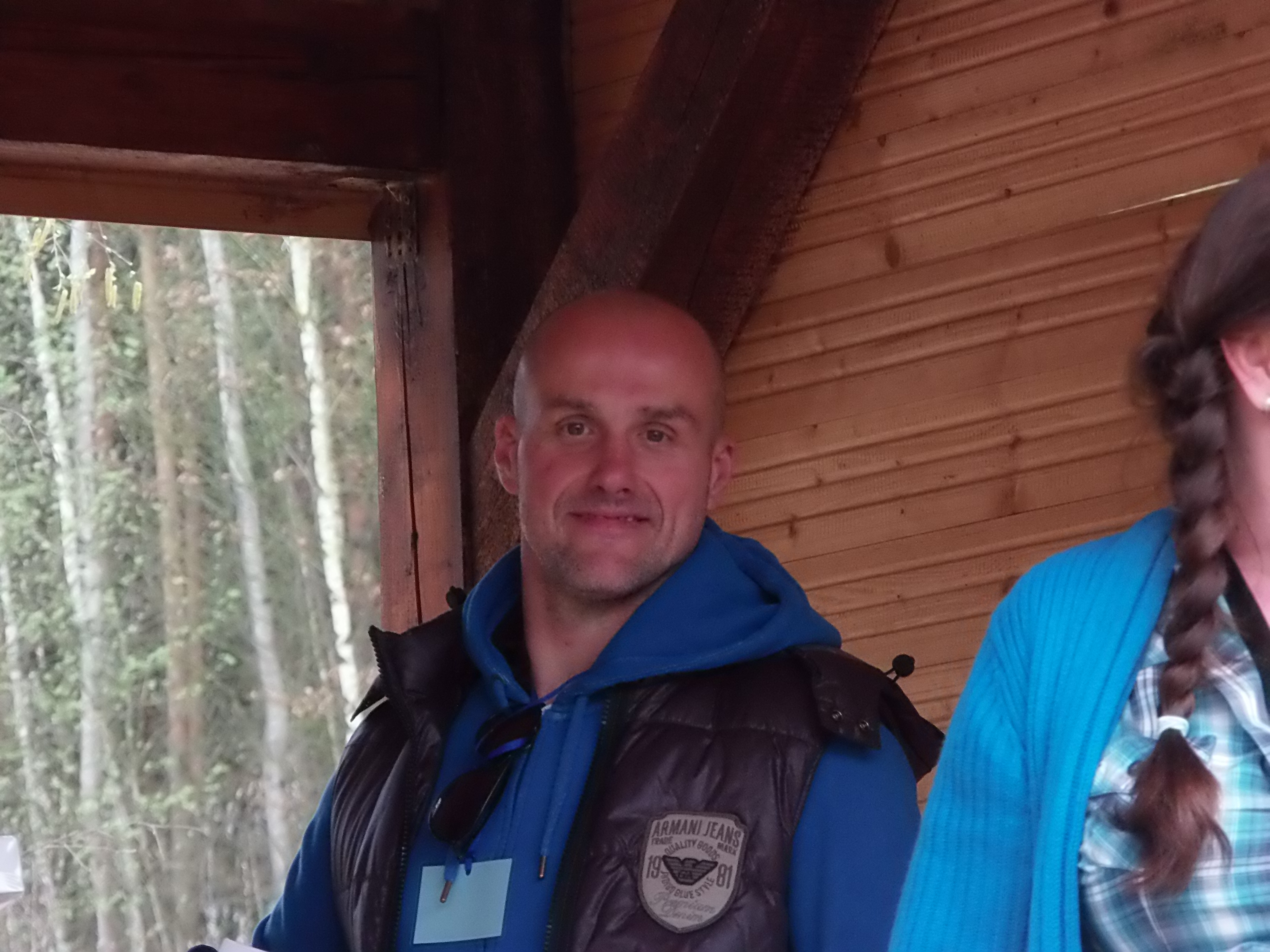 Martin Straka - loučení se sezónou a fanoušky